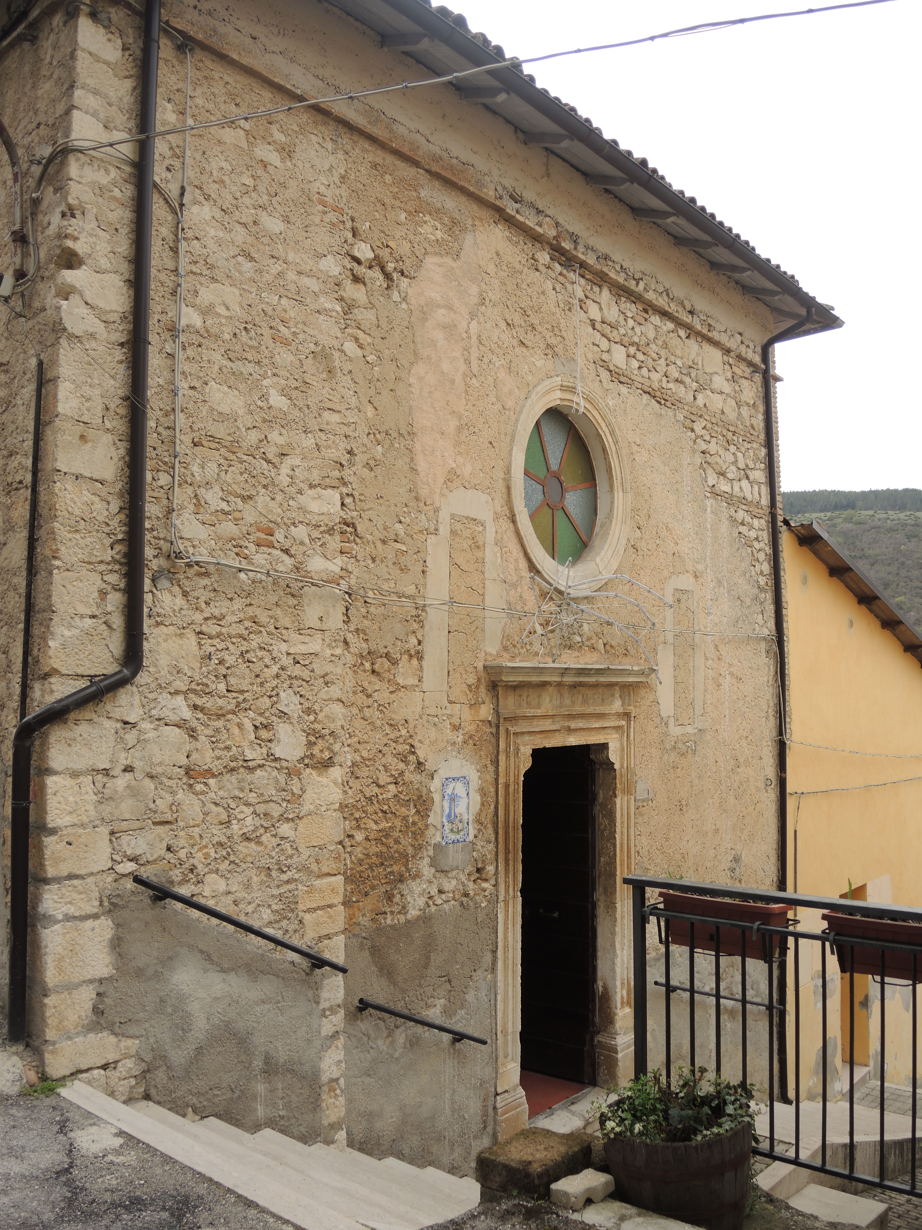 Goriano Sicoli: Chiesa di San Francesco